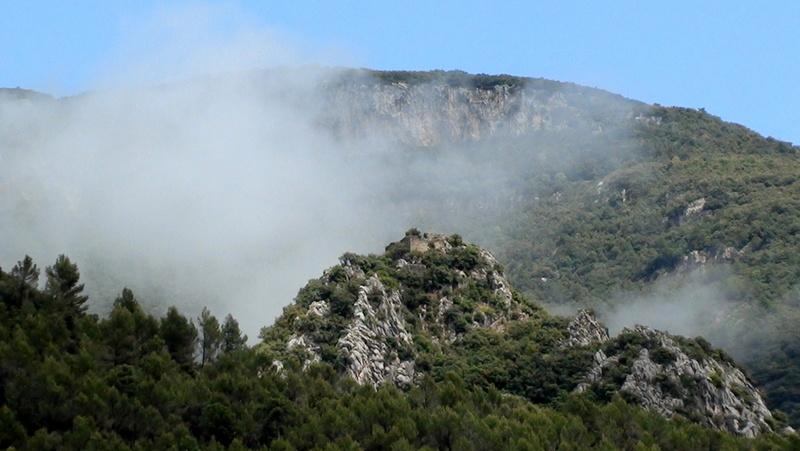 El Castellot de Beuda a la Comarca de la Garrotxa - Catalunya